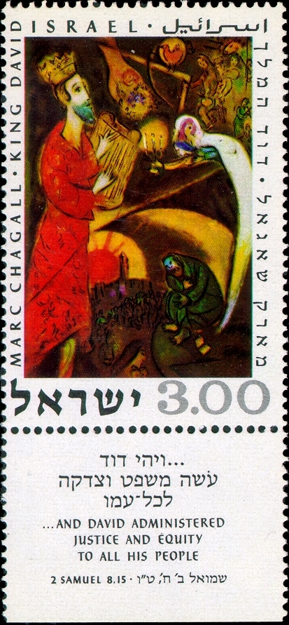 דוד המלך בציור של מארק שאגאל